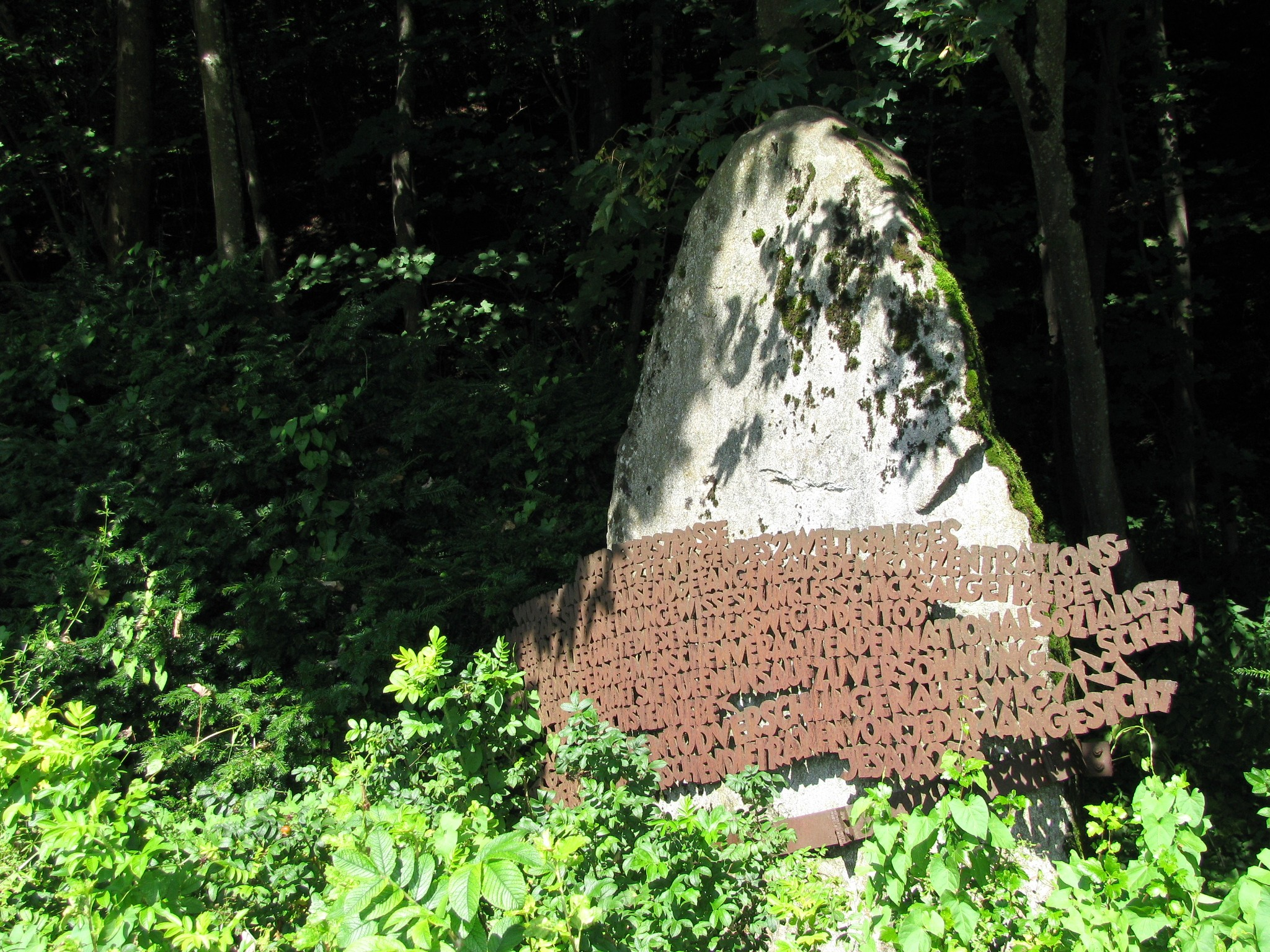 Mahnmal von Walter Habdank an den Todesmarsch von KZ-Häftlingen des KZ Dachau am Ende des Zweiten Weltkriegs durch das Würmtal; Standort bei der Kapelle Petersbrunn zwischen Starnberg und Leutstetten; Inschrift: Auf dieser Straße wurden in den letzten Tagen des 2. Weltkriegs mehr als 7000 Gefangene aus dem Konzentrationslager Dachau in ein ungewisses dunkles Schicksal getrieben Für viele führte dieser Leidensweg in den Tod Sie waren Opfer der menschenverachtenden nationalsozialistischen Gewaltherrschaft Sie rufen uns auf zu Versöhnung und NächstenliebeGott wird den Tod verschlingen auf ewig Der Herr wird abwischen die Tränen von jedem Angesicht Jesaja 25,8